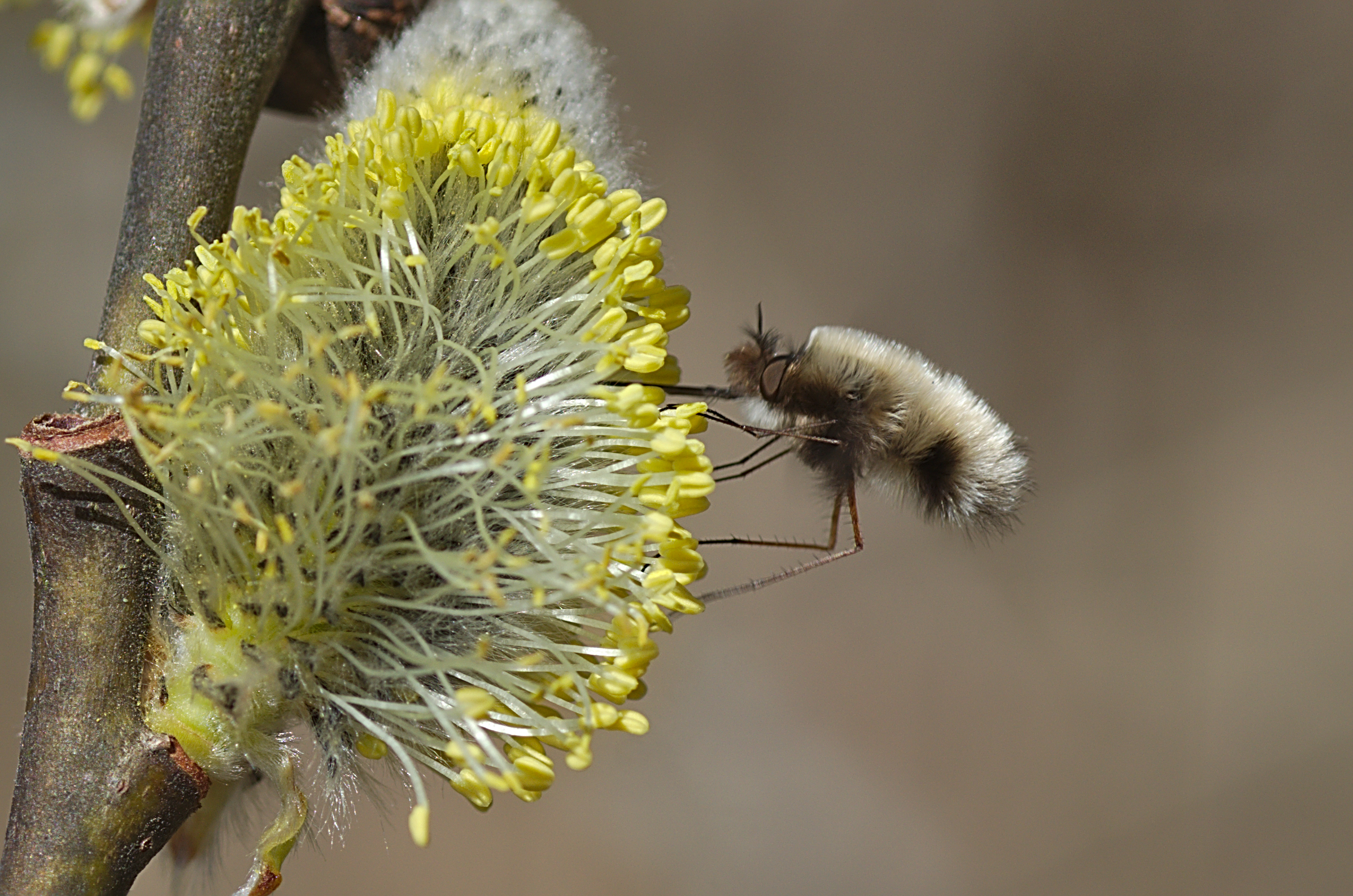 Wollschweber sammelt Nektar